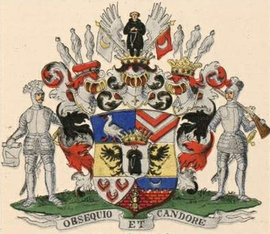 Münnichi suguvõsa krahvivapp